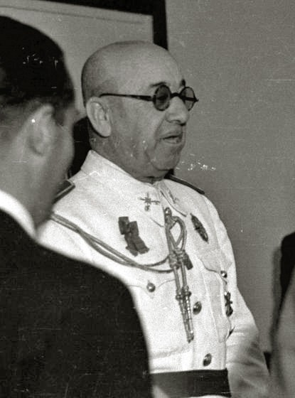 El general Moscardó presenciando un partido de pelota en el frontón de Gros de San Sebastián (España) en 1941